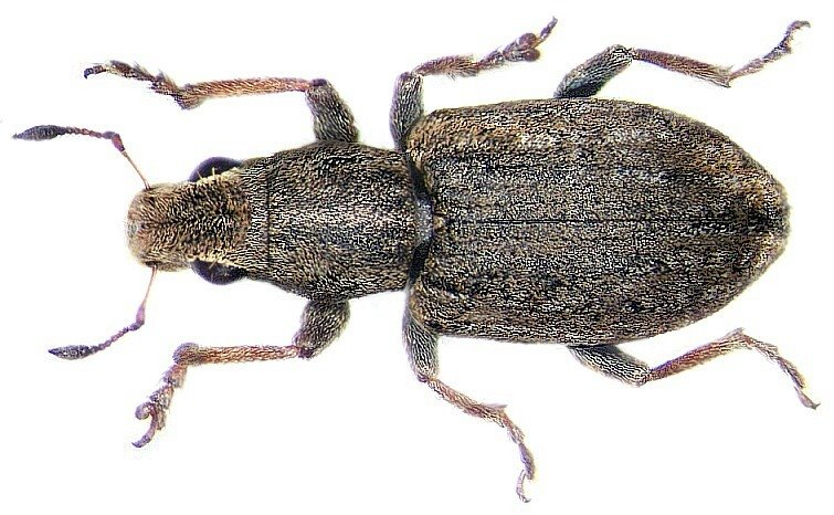 Familie: Curculionidae Grösse: 3,5-4,5 mm Verbreitung: Palaearktis Ökologie: an Lotus-, Trifolium-, Medicago- und Pisum-Arten Fundort: Germania, Bayern, Oberfranken, Selbitz leg.det. U.Schmidt, 2003 Foto: U.Schmidt, 2006